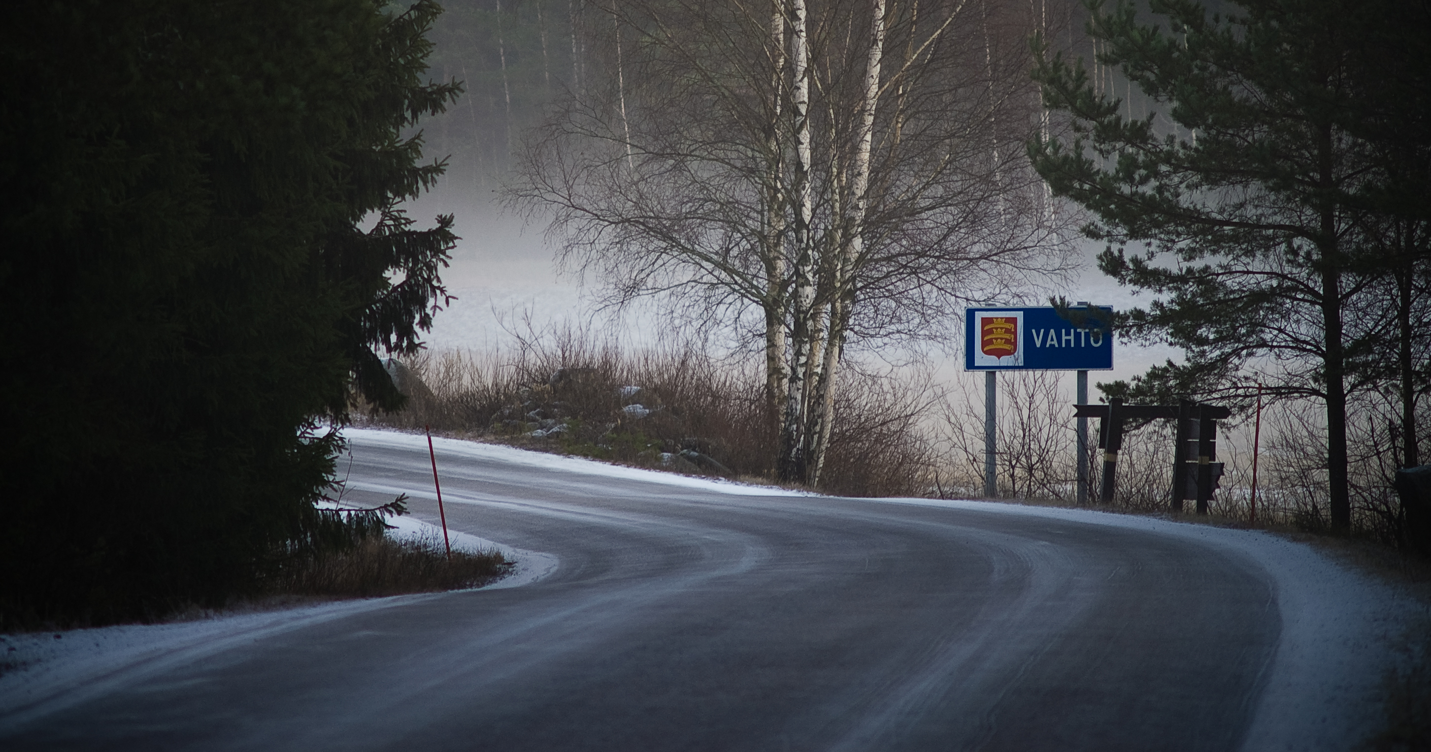 Vahdon ja Nousiaisten raja